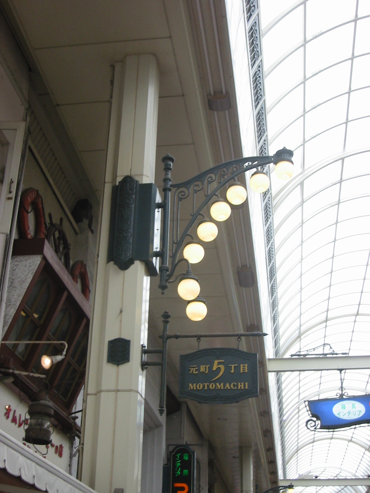 神戸元町商店街にて。